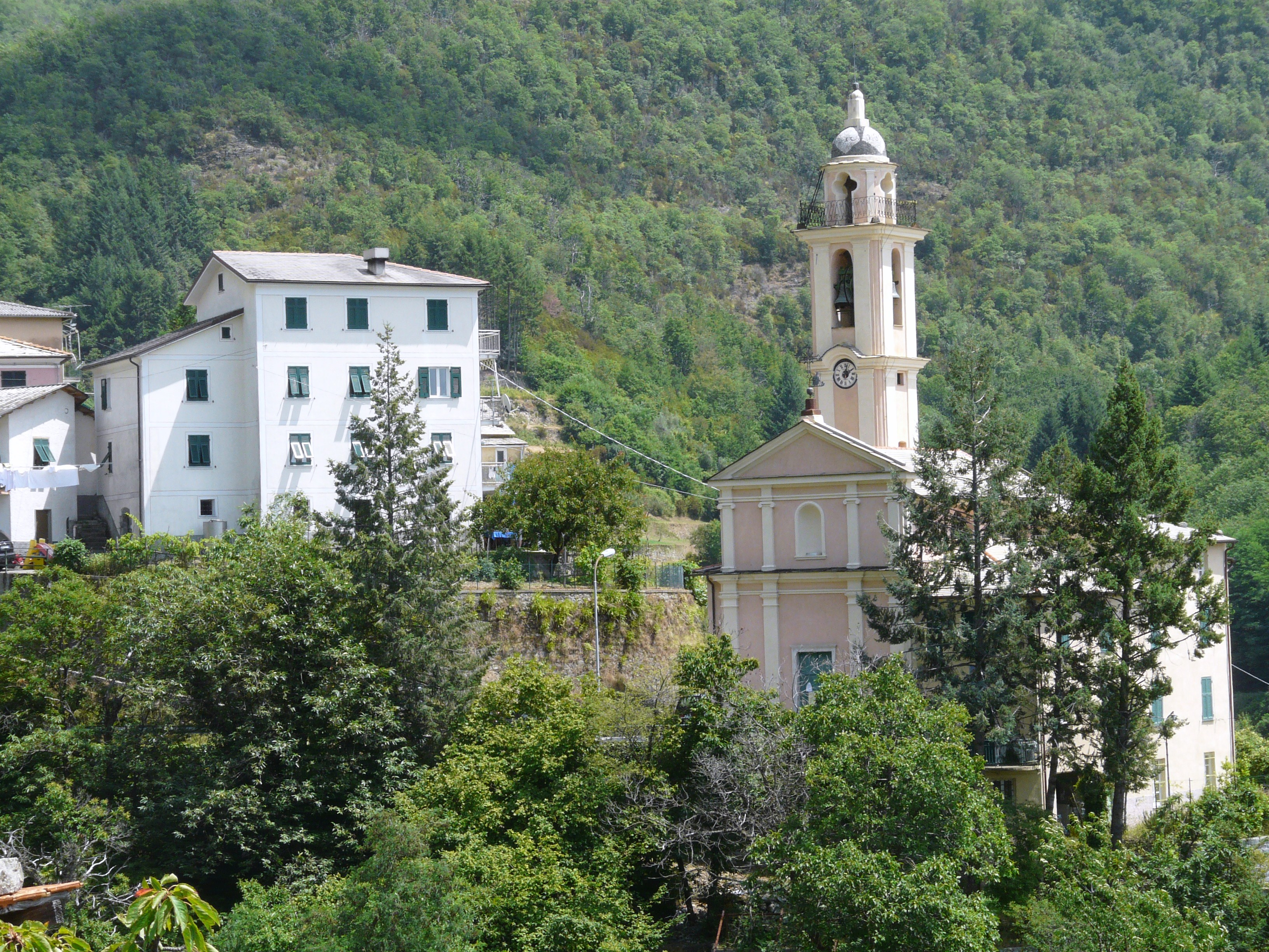 La chiesa di San Siro e la frazione di San Siro Foce, Mezzanego, Liguria, Italia